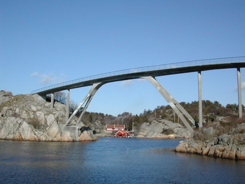 Bridge to Skjernøy in Mandal, Norway